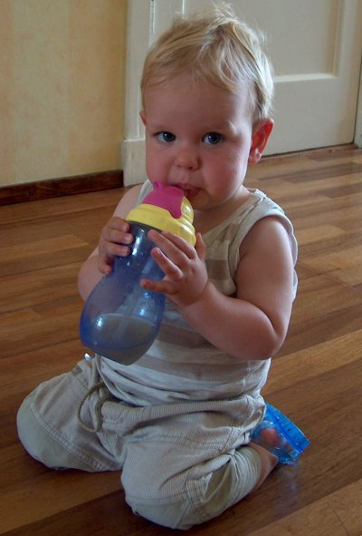 Afbeelding van 14 maanden oude peuter met fles. Bron: Frank van Marwijk (lichaamstaal)